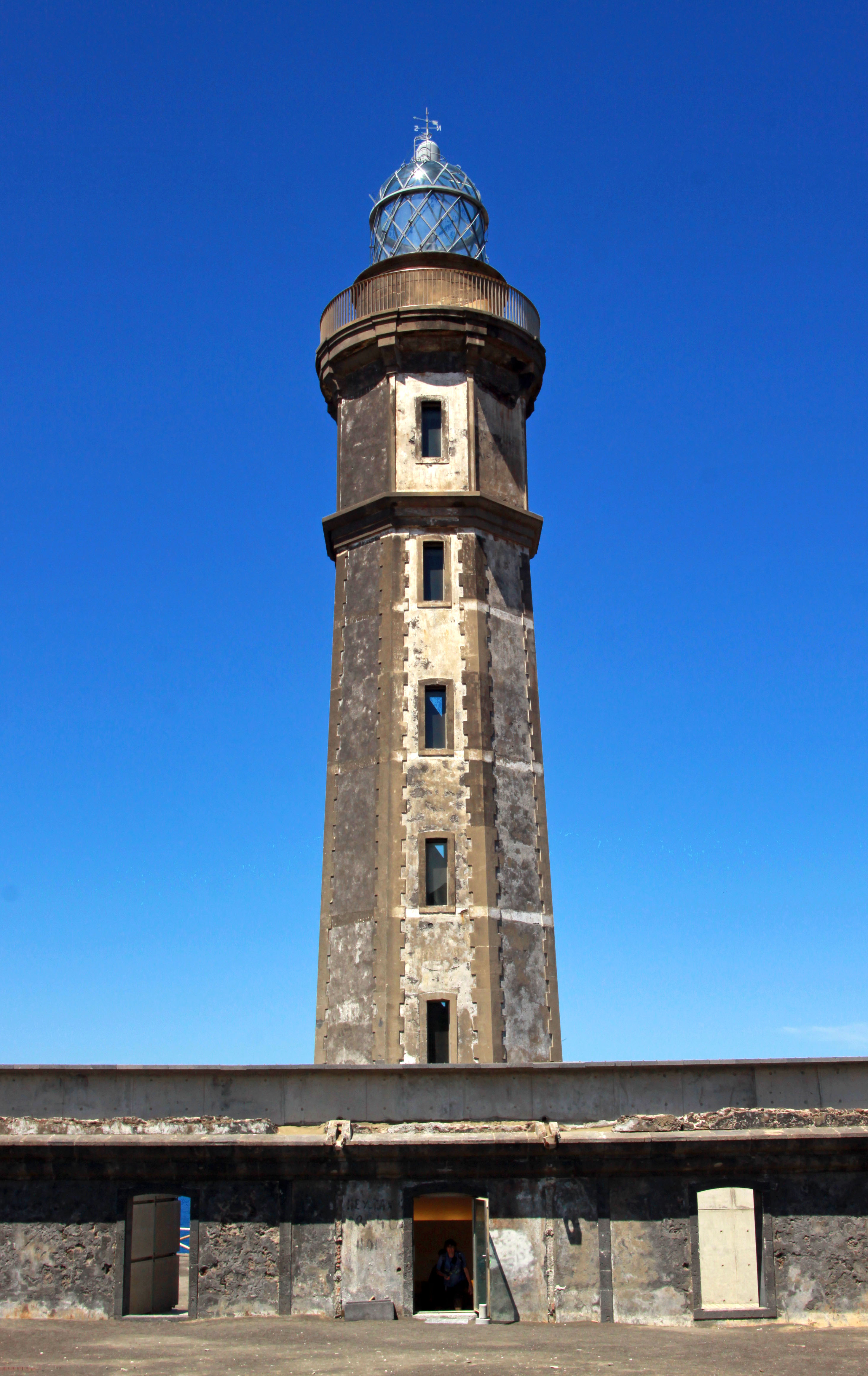 Ilha do Faial, Açores. Le phare de Capelinhos.